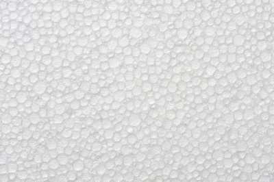 Пенополистирол